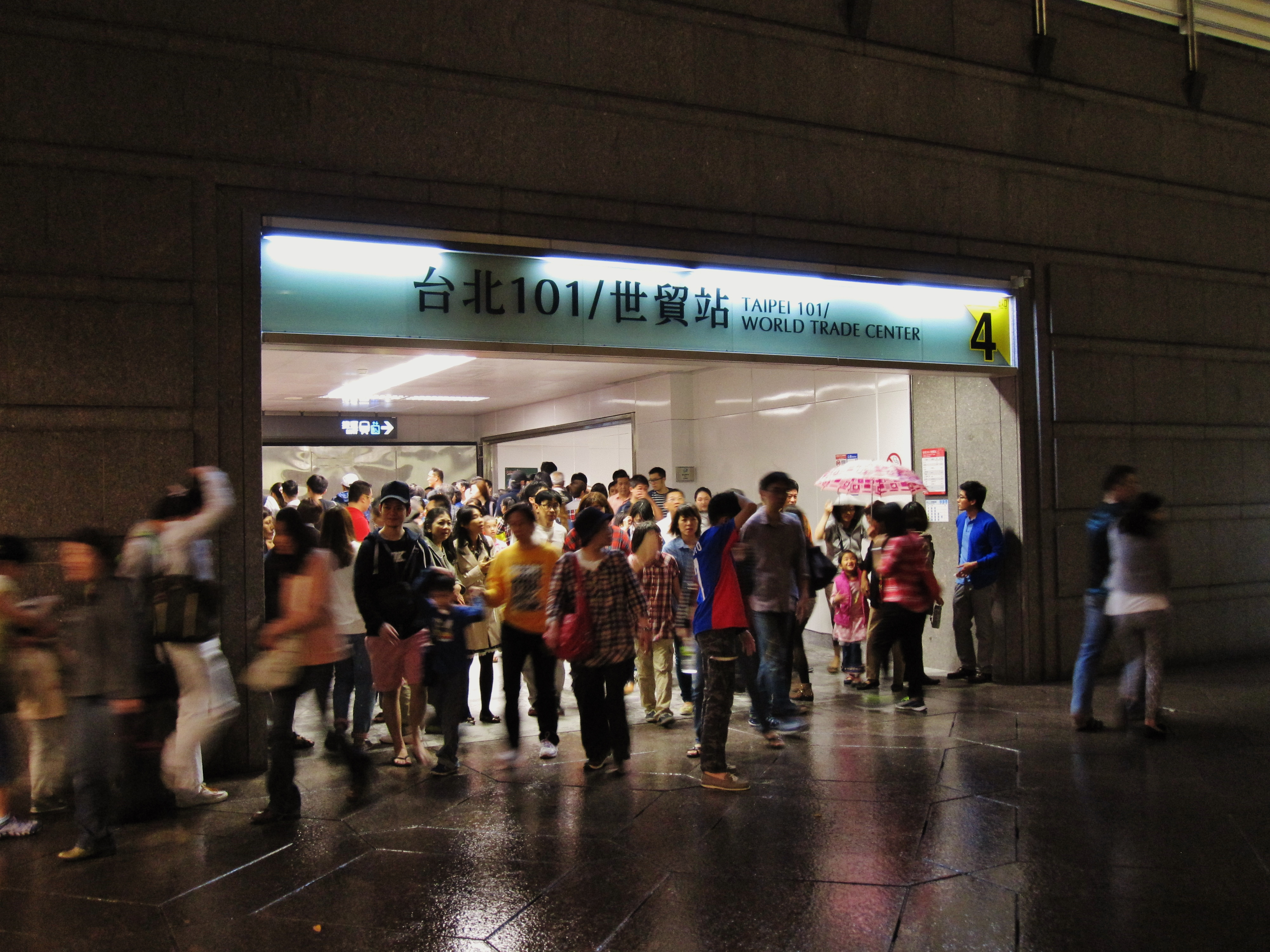 台北捷運信義線台北101/世貿站出口4。